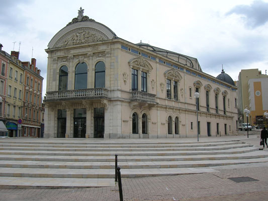 Théâtre Municipal de Roanne